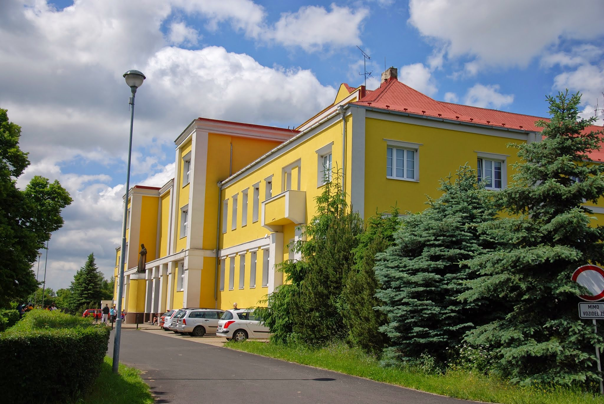 Budova školy (resp. čelního traktu) v roce 2014.